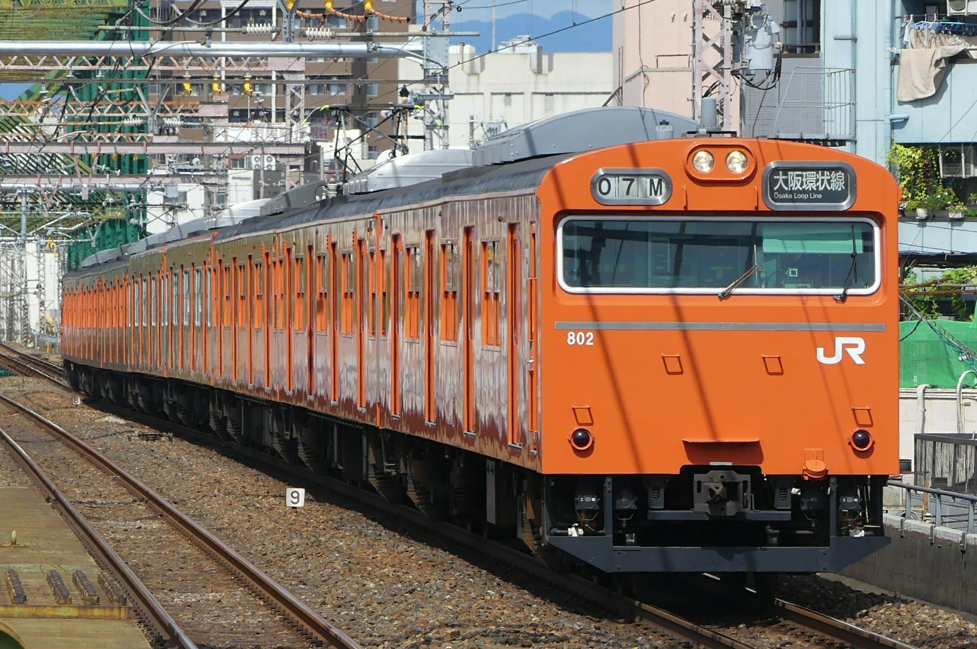 大阪環状線用の103系LA4編成